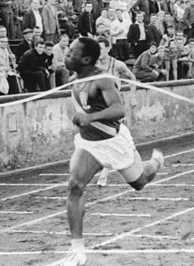 Enrique Figuerola Zentralbild Dörries 3641.A.-V. 20.7.1961 Freunde in der DDR Die prominentesten und erfolgreichsten Teilnehmer an einem Abendsportfest am 19.7.1961 im Potsdamer Ernst-Thälmann-Stadion waren die von 2500 Zuschauern herzlich gefeierten Leichtathleten der gegenwärtig in der DDR weilenden Sportdelegation aus Kuba. UBz: Zum Höhepunkt wurde der 100-m-Lauf, den der kubanische Olympia-Vierte von Rom Enrique Figuerola klar gewann. Figuerola lief die 100-m in 10,3 Sek. und verfehlte damit seine Bestleistung nur um eine Zehntel-Sekunde.